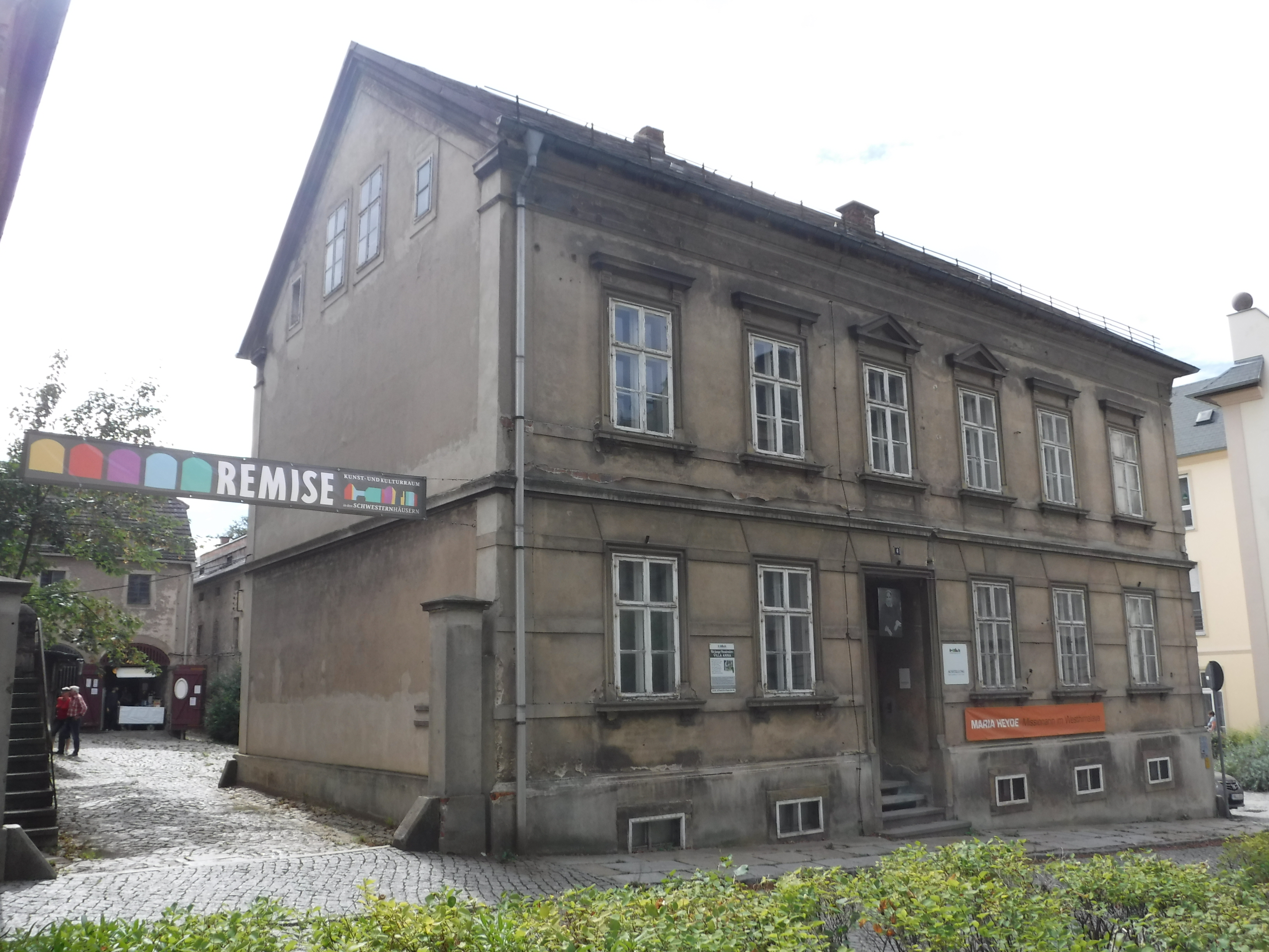 Wohnhaus / Kleines Schwesternhaus, Peter-Buck-Straße 2, 02625 Bautzen-Kleinwelka 1795 Einzeldenkmal der Sachgesamtheit Kolonie Kleinwelka; Putzbau mit Drempel und Satteldach, baugeschichtlich und ortsgeschichtlich von Bedeutung. Zweigeschossig, mit Drempel und Hechtgaupe, stark verändert; innen weitgehend unverändert Einzeldenkmal 09253103 zu ID-Nr. 09300736